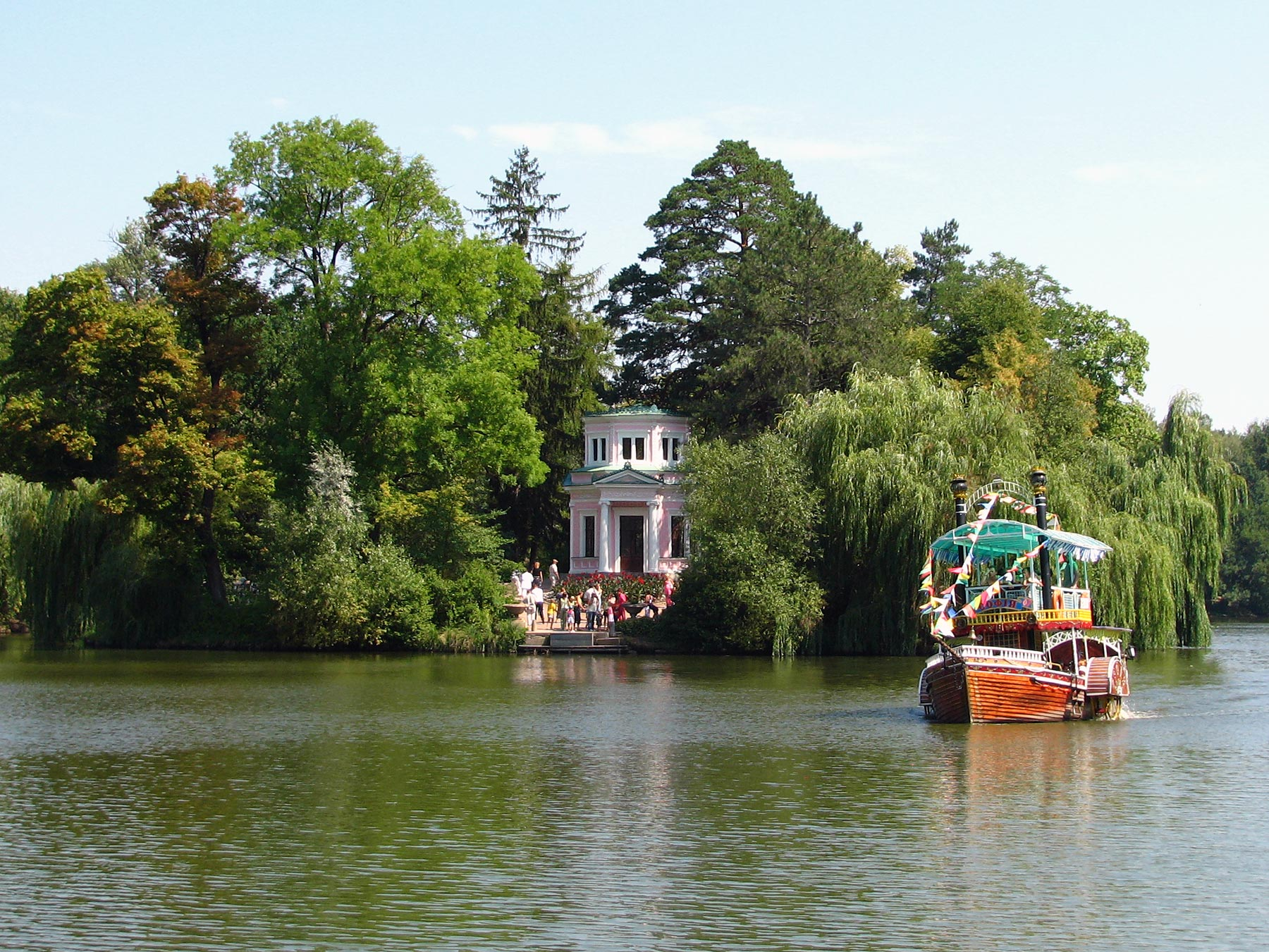 Sofijivsky Park in Uman, Ukraine